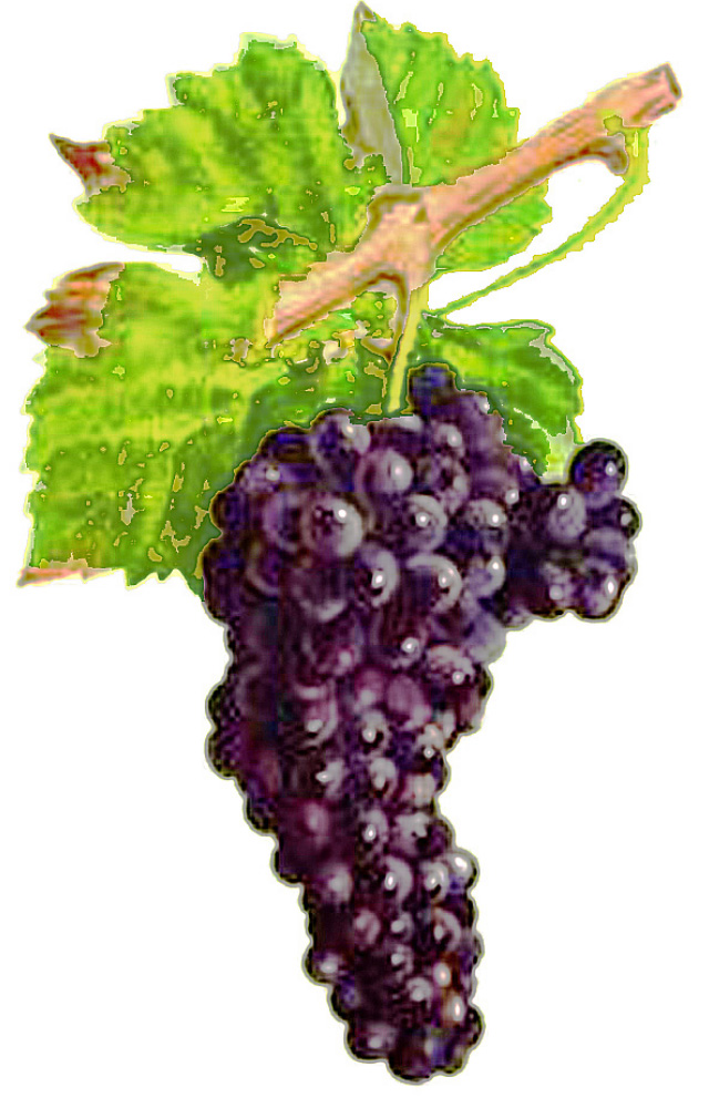 Grappe de Mondeuse par Viala et Vermorel